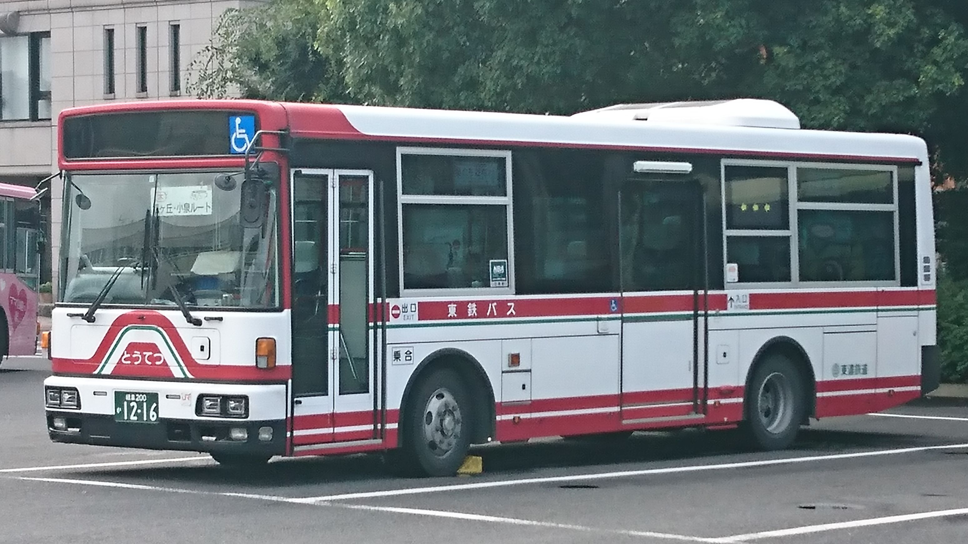 総合福祉センター・太平公園線